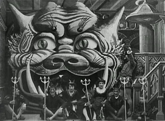 Méliès, Le diable au couvent (Star Film 185-187) 2